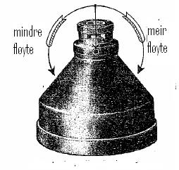 Westfalia separator, justering av fettinnhald i fløyten Kjelde: Westfalia Gebrauchs-Anweisung (ca. 1930-35) Westfalia har gitt løyve til bruk av teikningane: sie können die drei Bilder von Westfalia Separator in dem Arktikel verwenden. / Mit freundlichen Grüßen / i. A.Christiane Lohmüller / Westfalia Separator AG / Corporate Communications